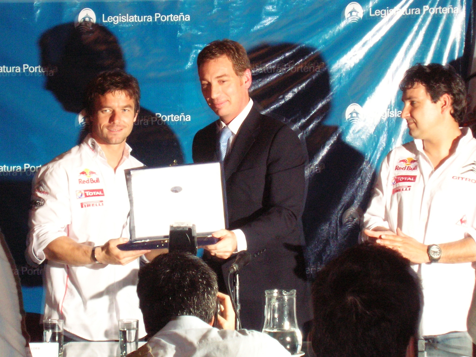 Distincion a Sebastien Loeb (FRA) por Diego Santilli en la Legislatura Porteña de Buenos Aires, Argentina. Año 2009.